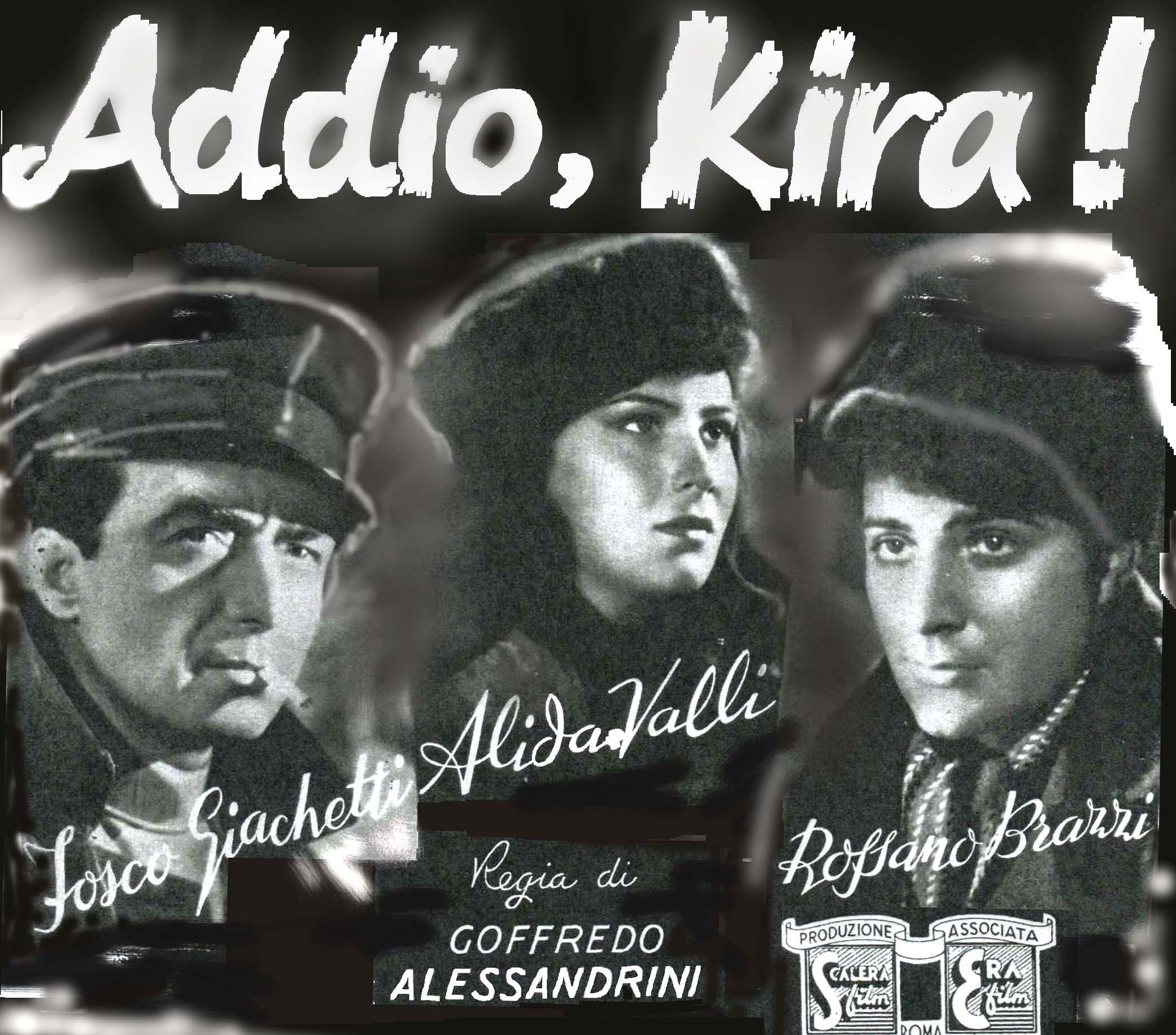 Immagine promozionale di "Addio Kira!" (Alessandrini, 1942)